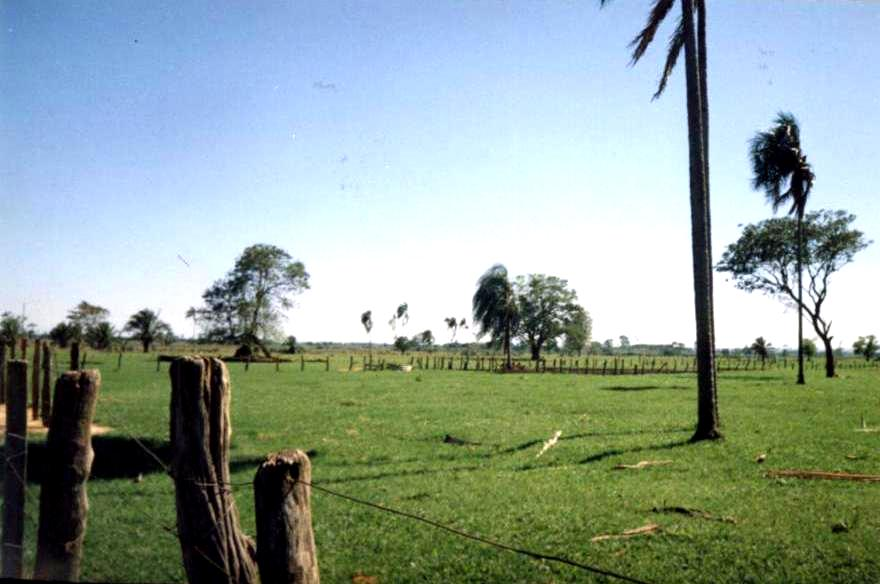 Campo de Três Lagoas.